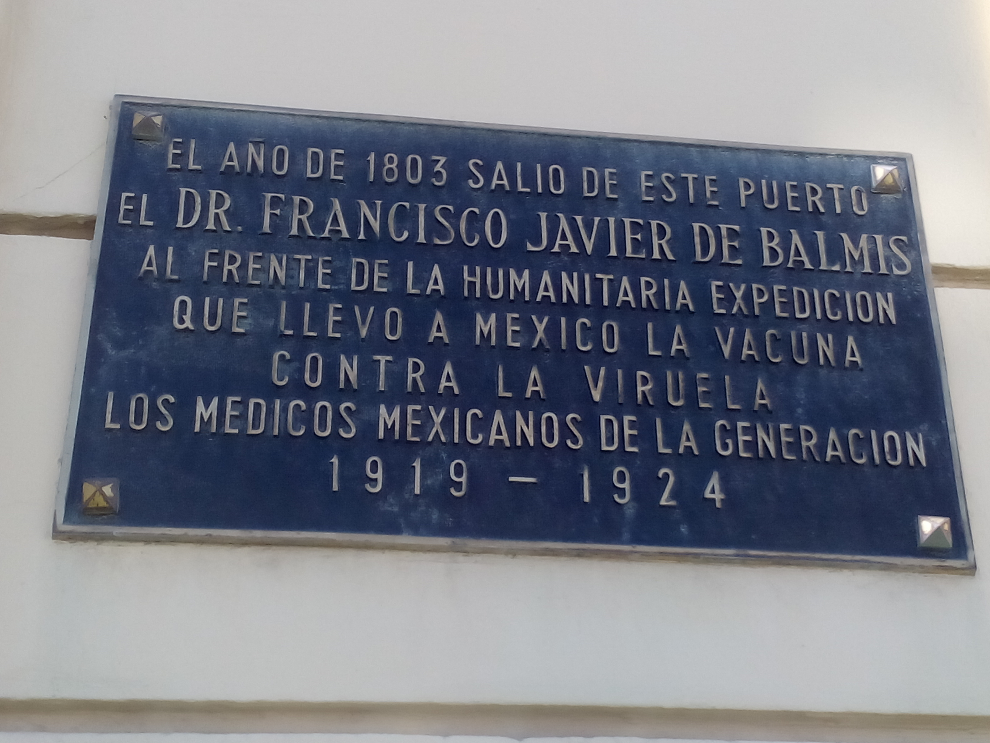 Placa situada no edificio dos Prácticos do Porto da Coruña na que os médicos mexicanos da xeración 1919-1924 homenaxean a Francisco Javier de Balmis e á Real Expedición Filantrópica da Vacina.